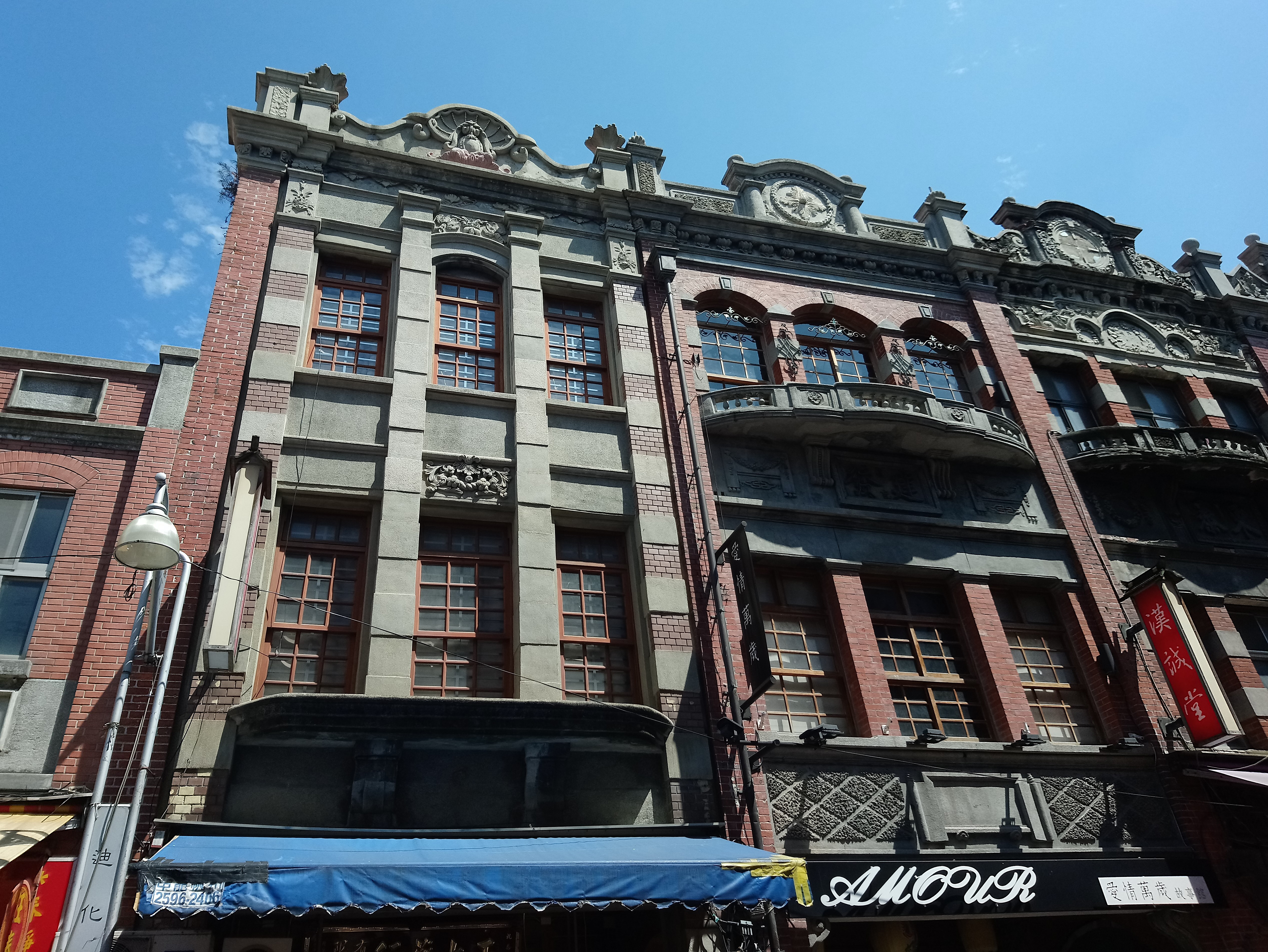 正太藥行與坤樹藥材公司,台北市大同區延平次分區大有里